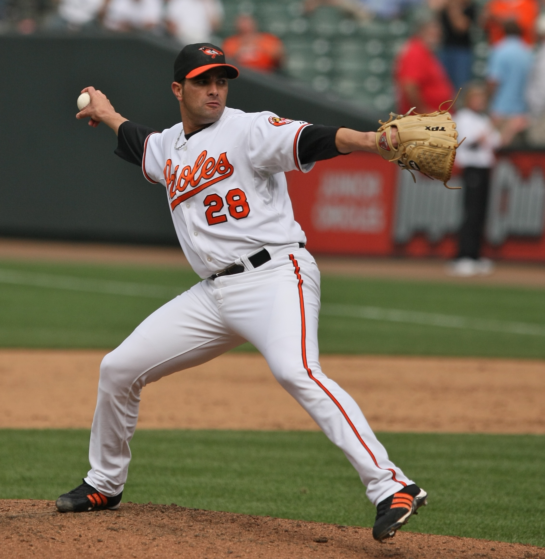 Danys Báez